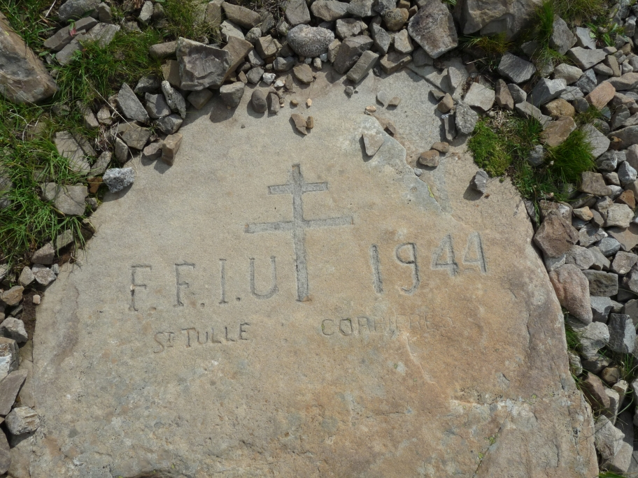 Trace du passage d'une unité FFI à proximité de l'ouvrage du col de la Moutière